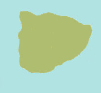 Ritchie's Archipelago South Button Island - Button Islands (Andaman Islands)